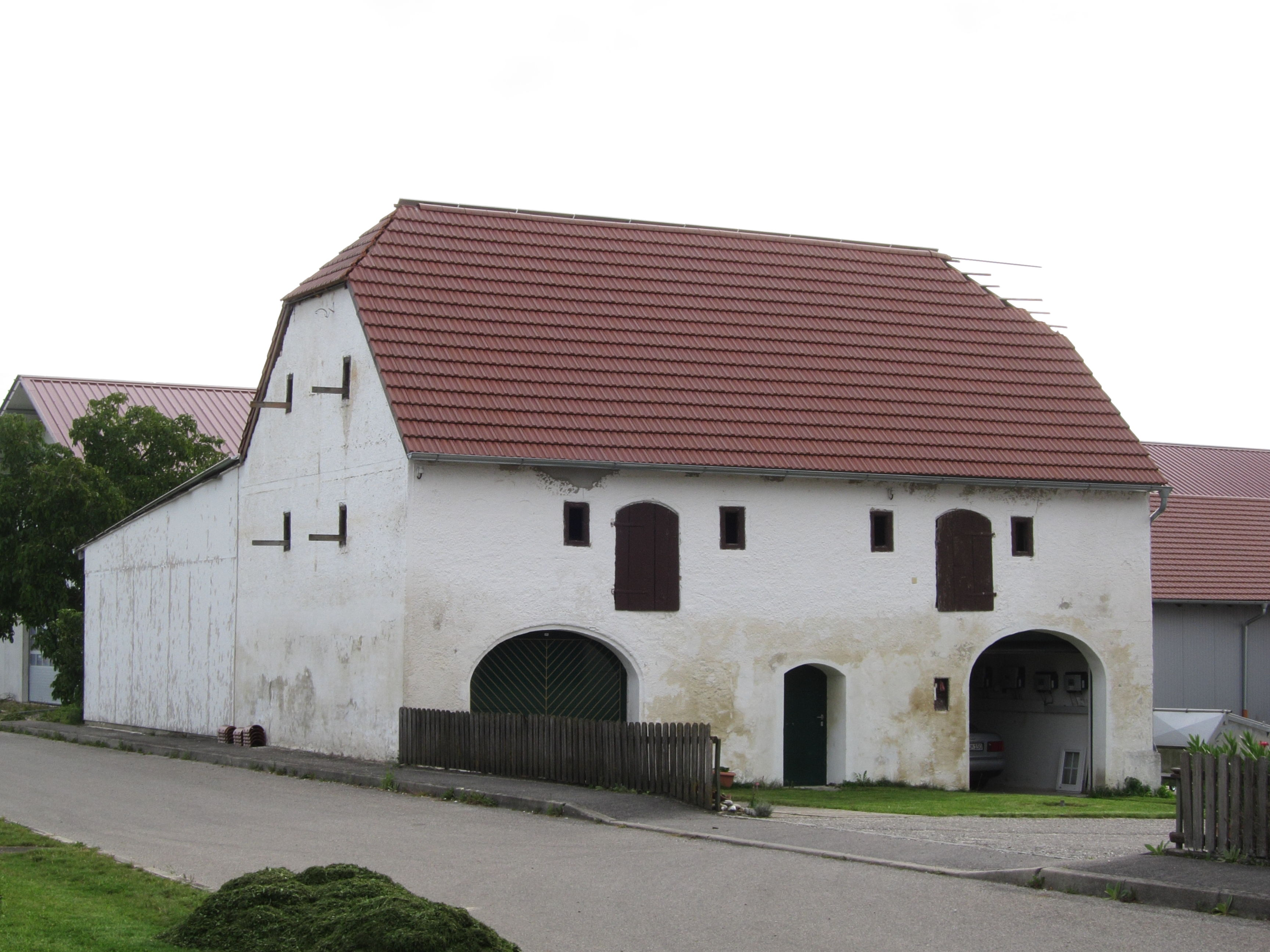 Lohkirchen 22; Remise eines Dreiseithofes, Massivbau mit Schopfwalmdach und Traidboden, am Ostgiebel mit Fischgrätenmuster-Zierputz, 2. Viertel 19. Jahrhundert.